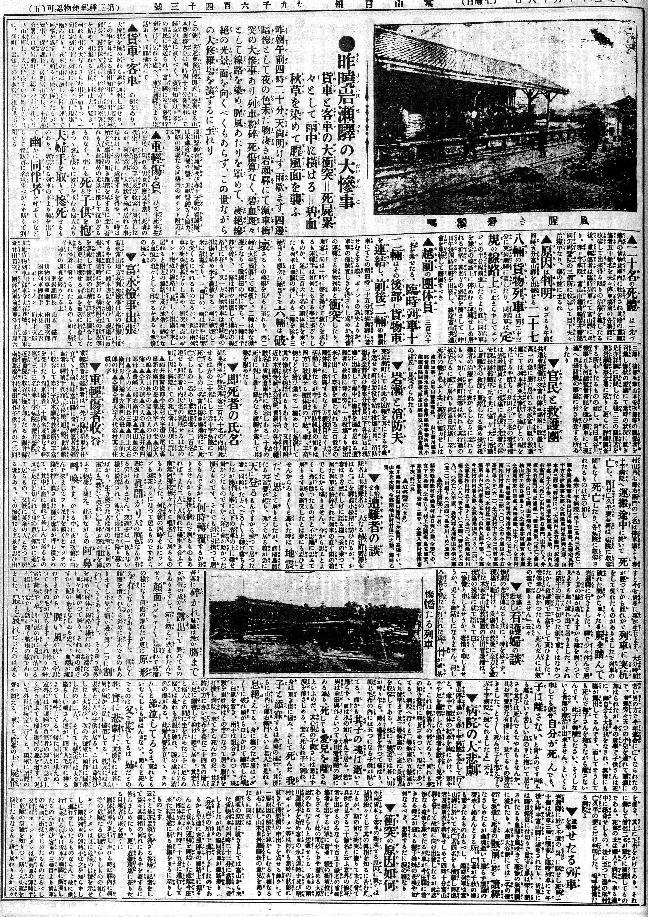 1913年（大正2年）10月17日の東岩瀬駅における衝突事故を報ずる新聞記事